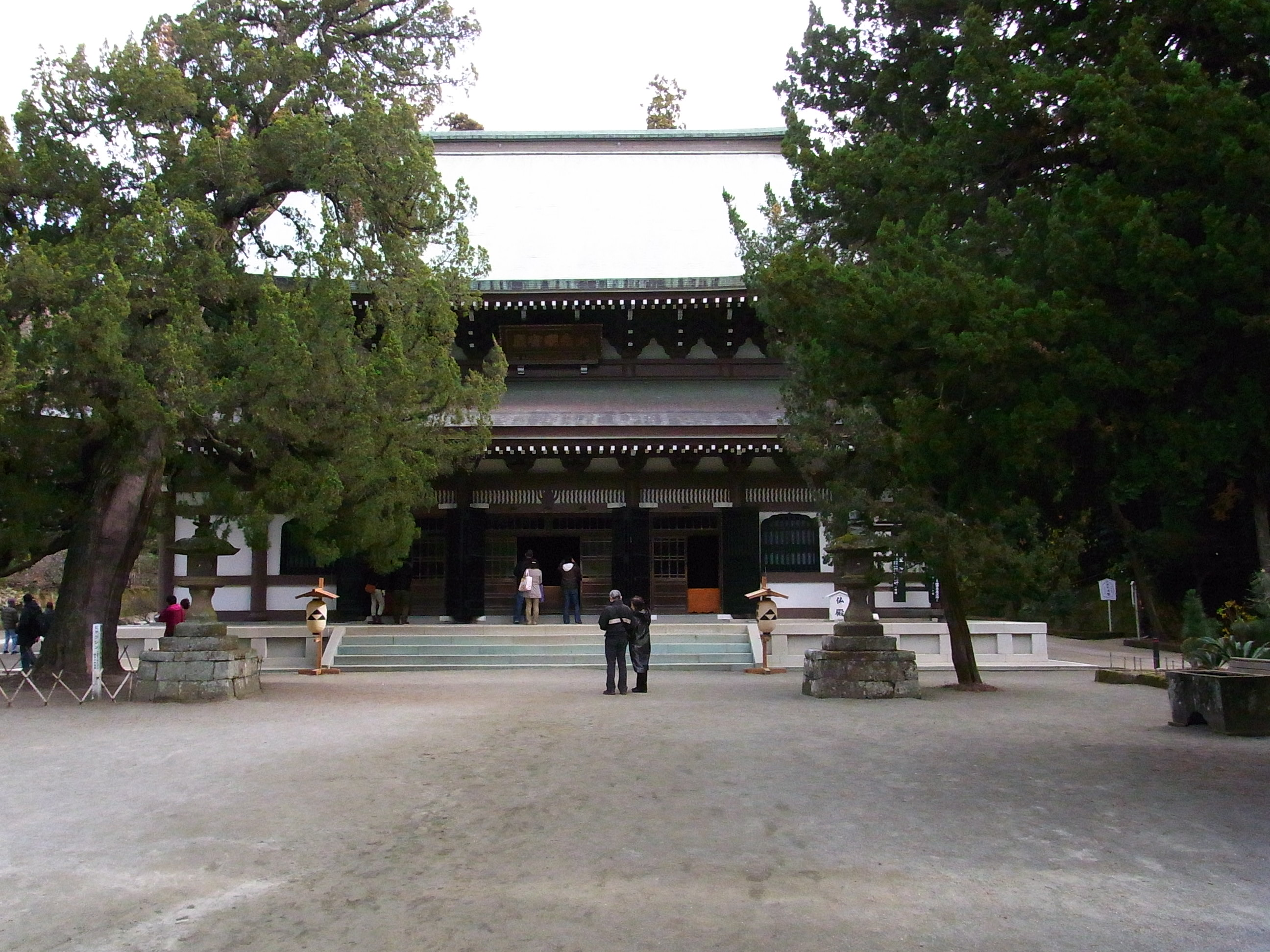 （2011年1月3日撮影）